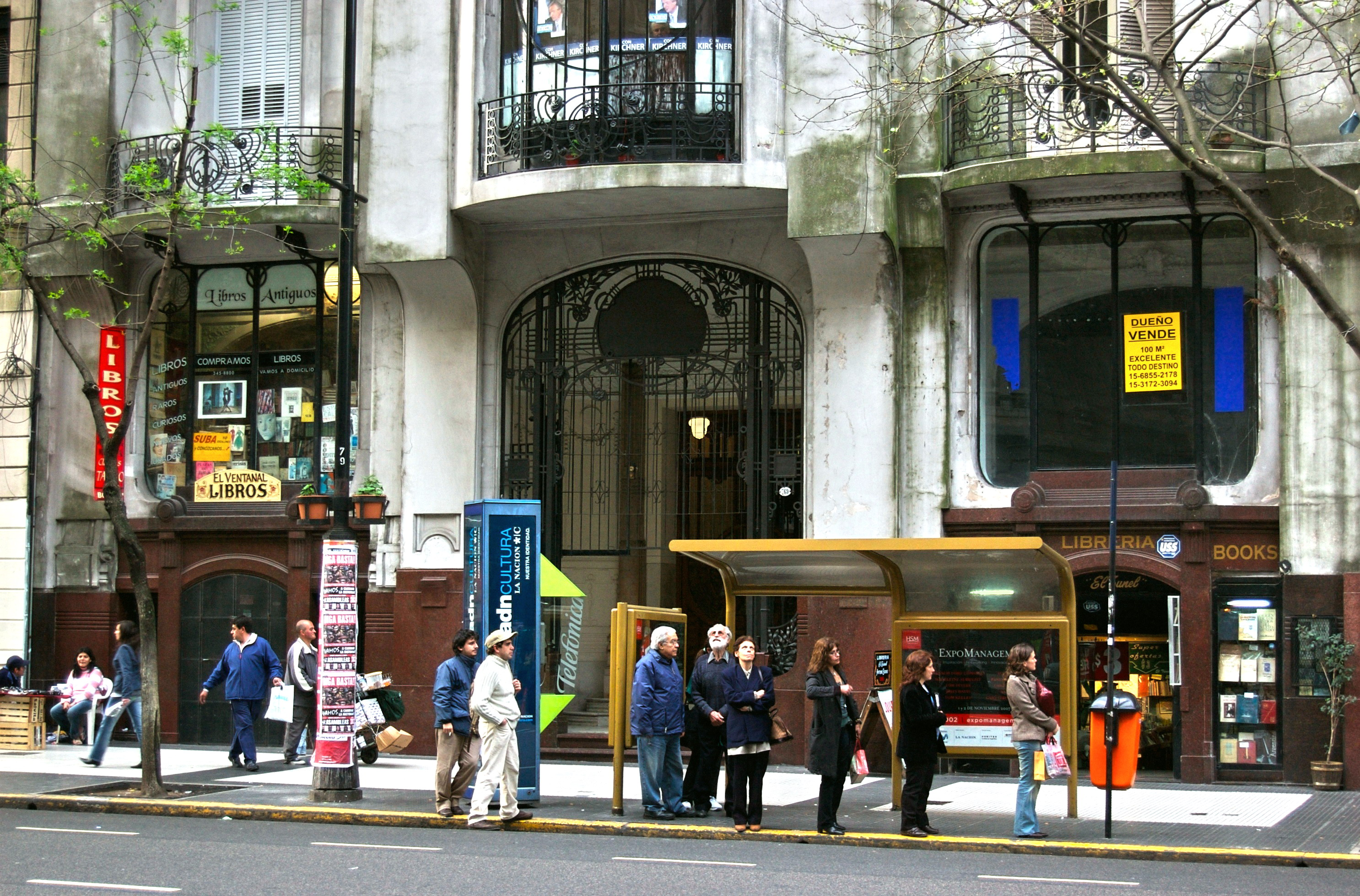 Avenida de Mayo 767-777, Buenos Aires, Argentina. Palacio art noveau con líneas curvas y vidrios biselados. Construido en 1910 por los arquitectos Prins y Ranzenhofler para ser habitado por la familia Díaz Vélez. hoy en día alberga a dos librerías que se especializan en primeras ediciones y ejemplares raros.